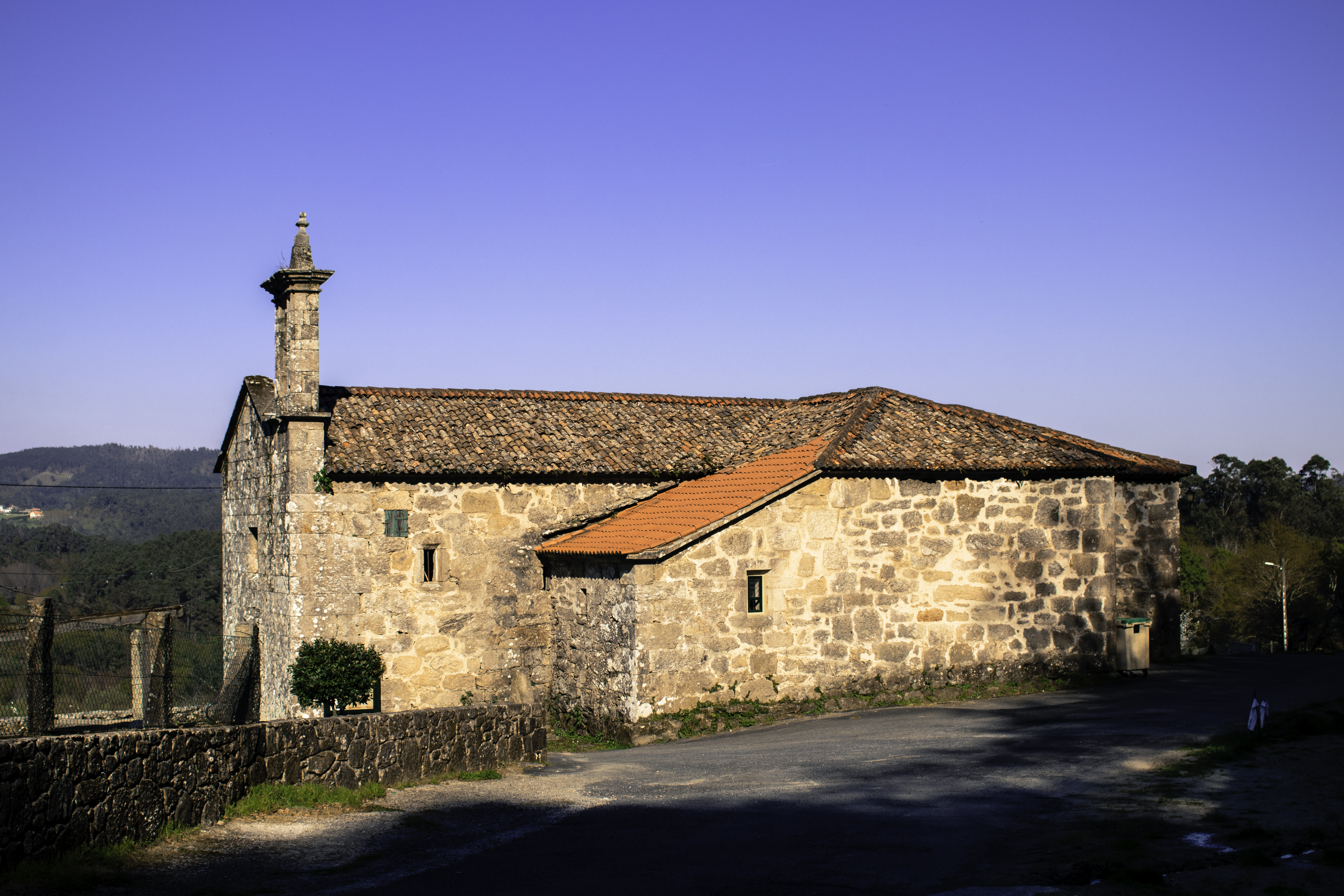 Santuario da Nosa Señora da Mercé, Bandín, Padrón.